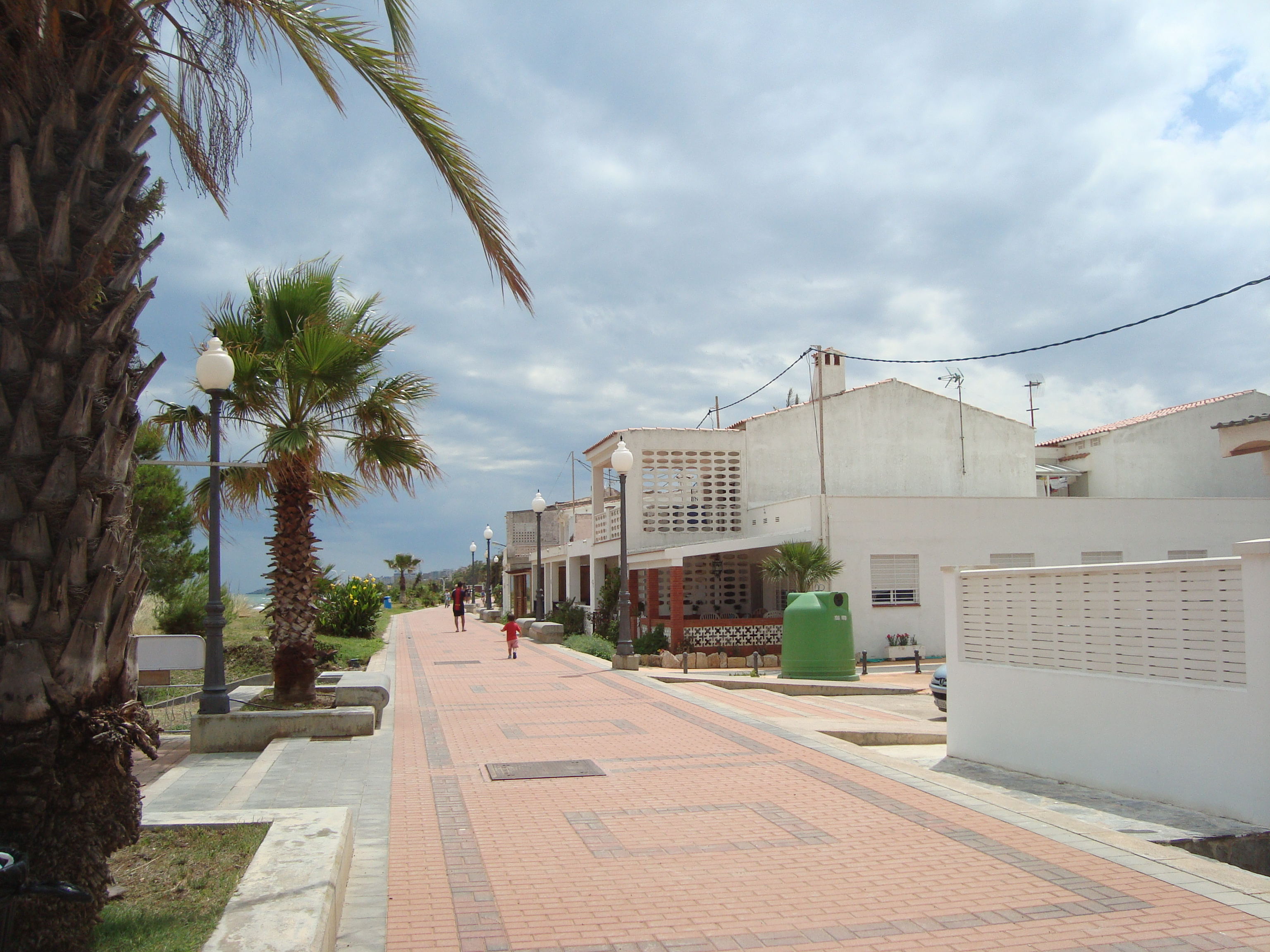 Aldea de Torrelasal